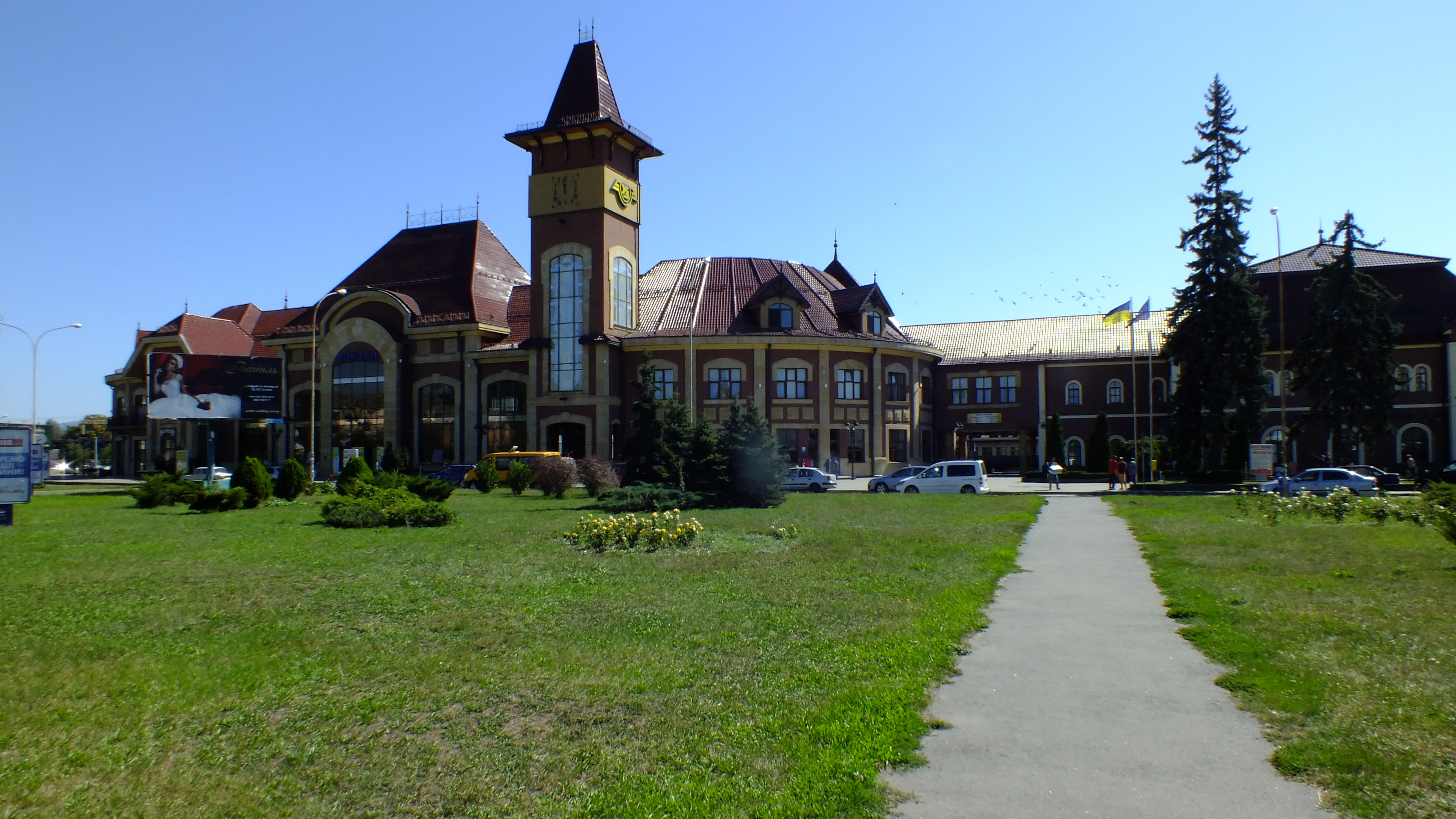 Železniční stanice Užhorod